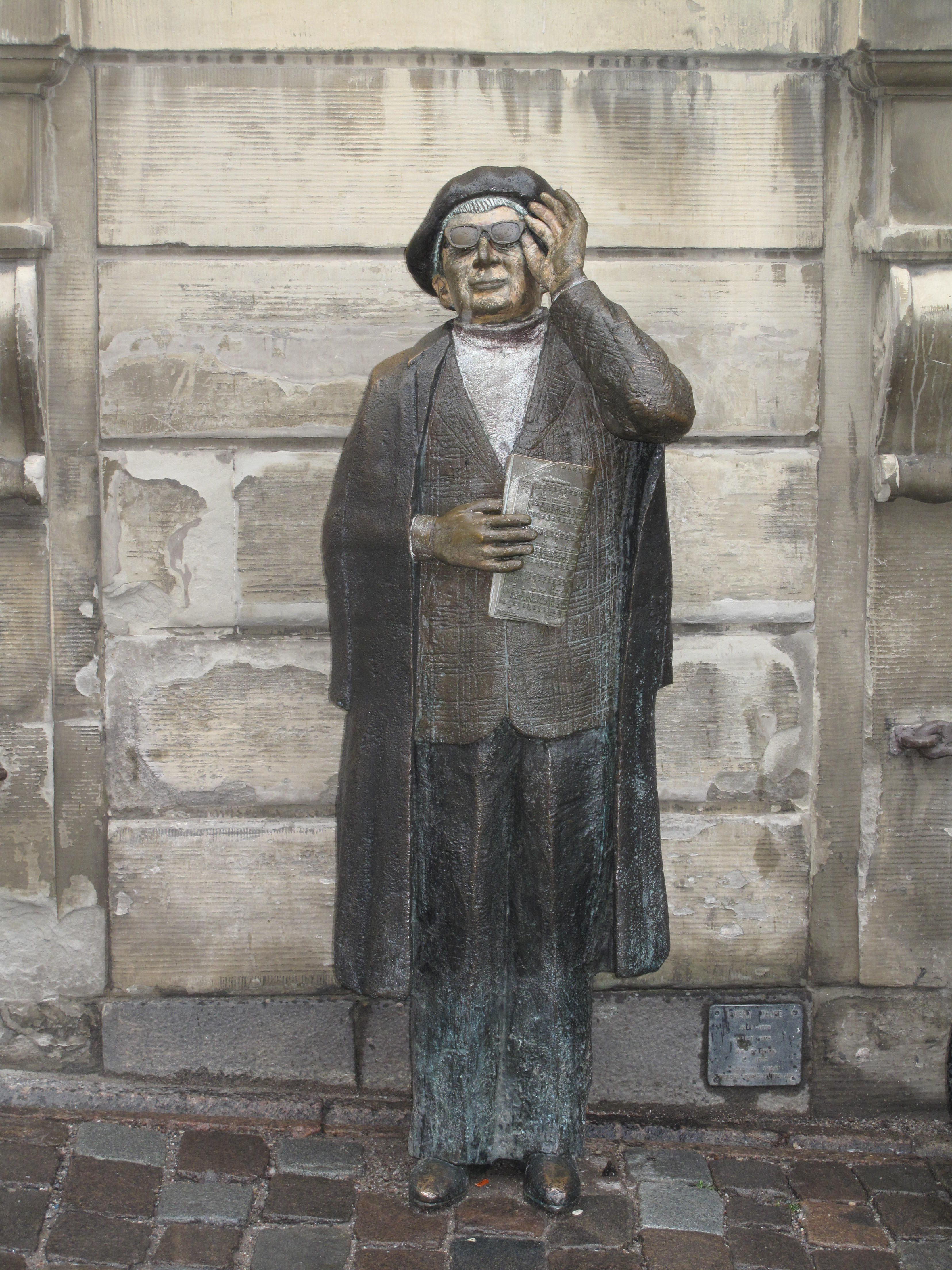 Evert Taubestaty i Gamla stan